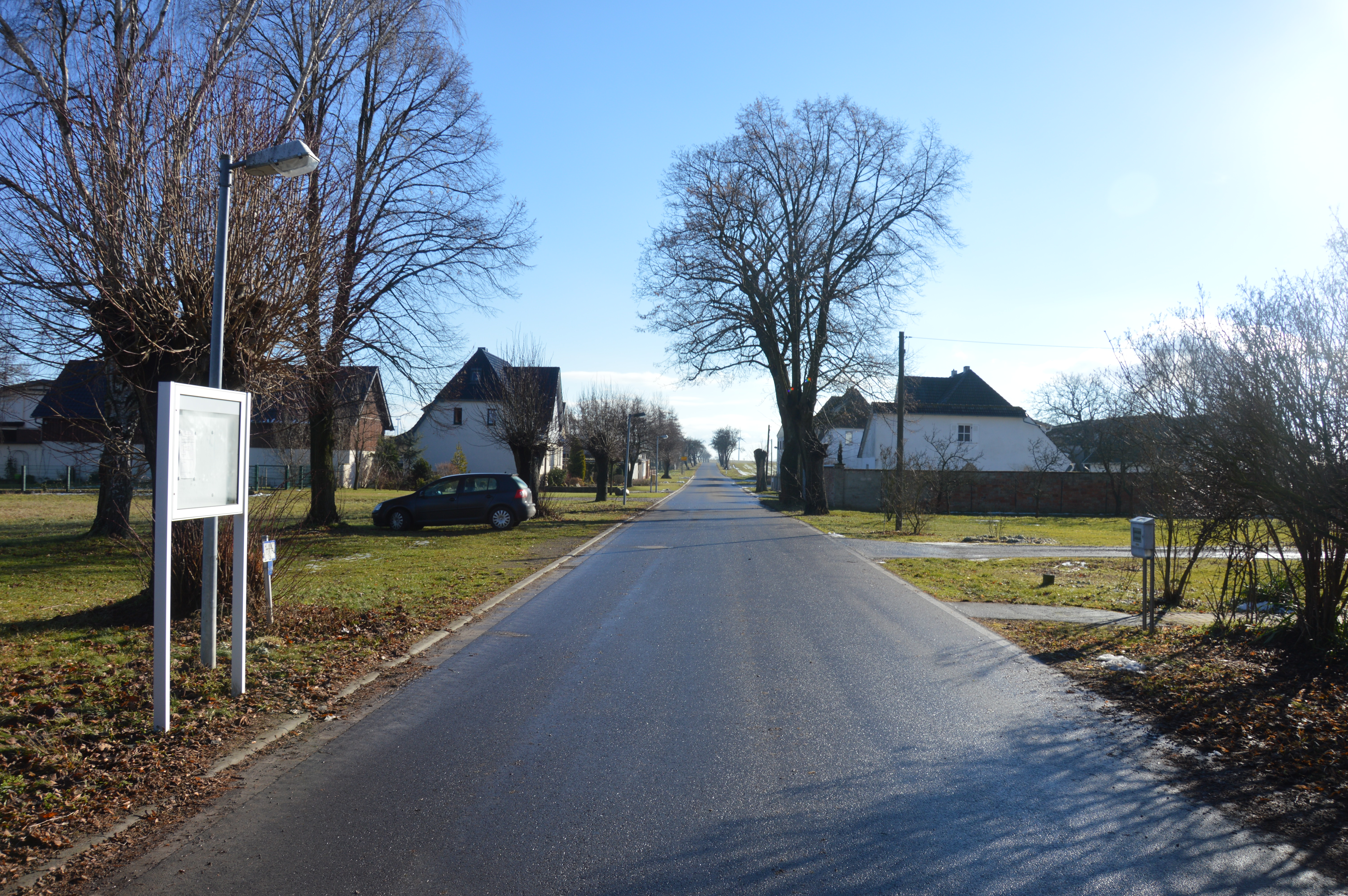 Straßenzug Neu Ummendorf